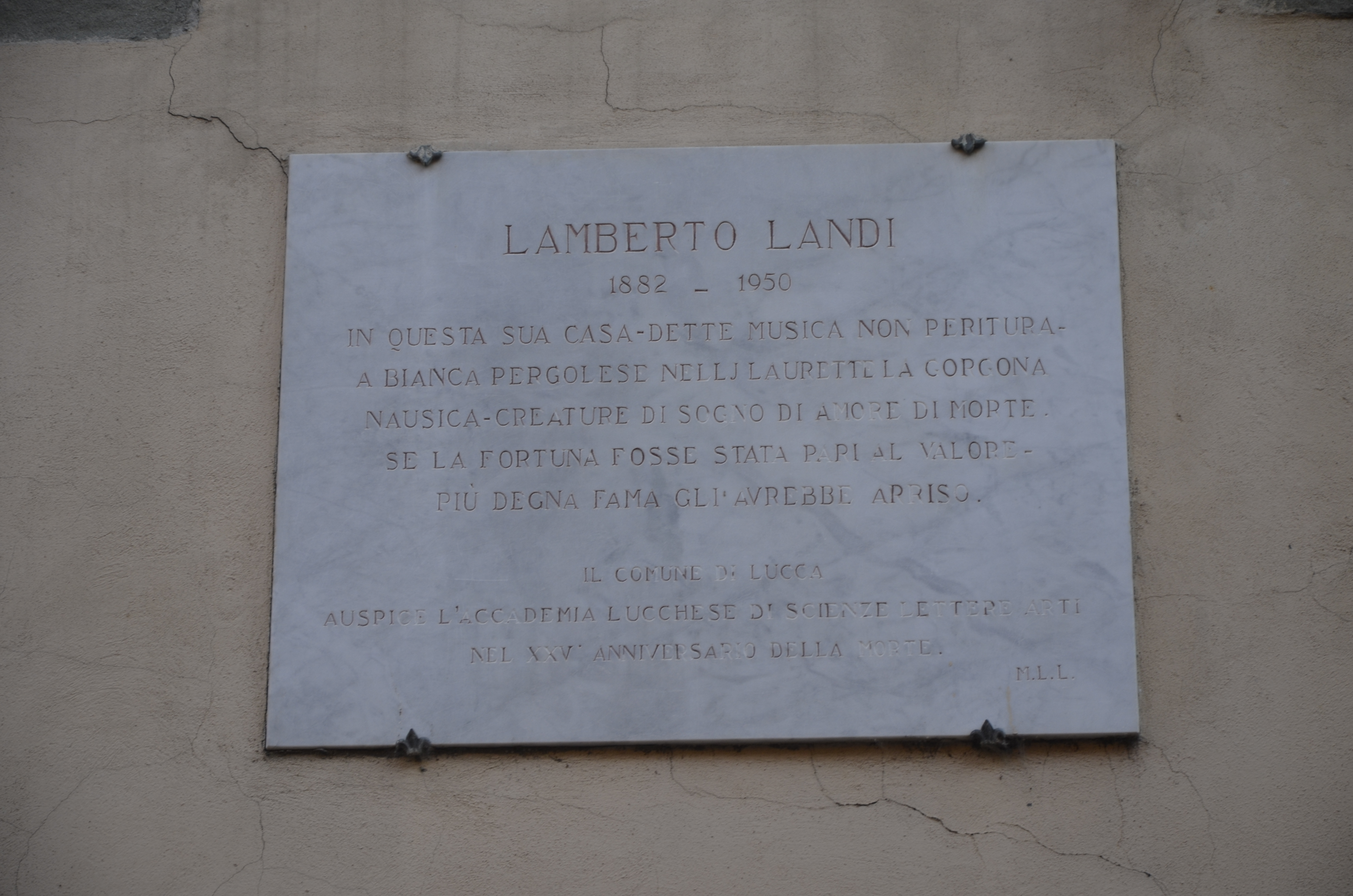 Lapide alla memoria del maestro Lamberto Landi proprio sotto la finestra xella sua casa natale.